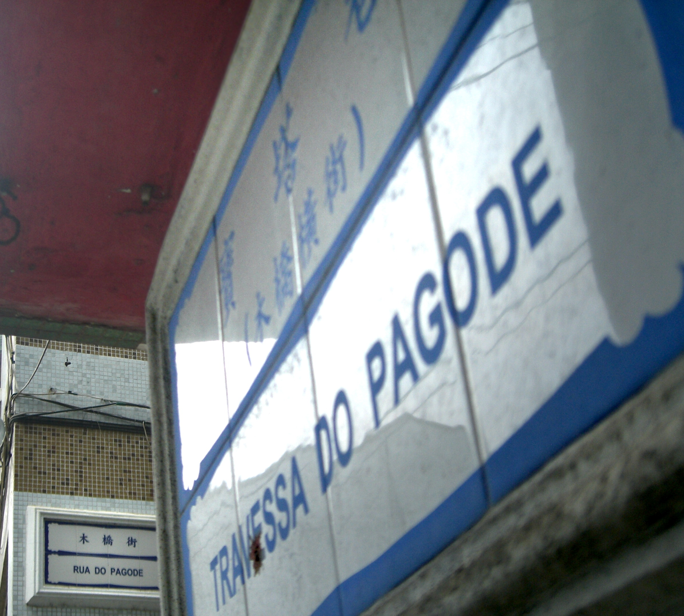 Rua e Travessa do Pagode